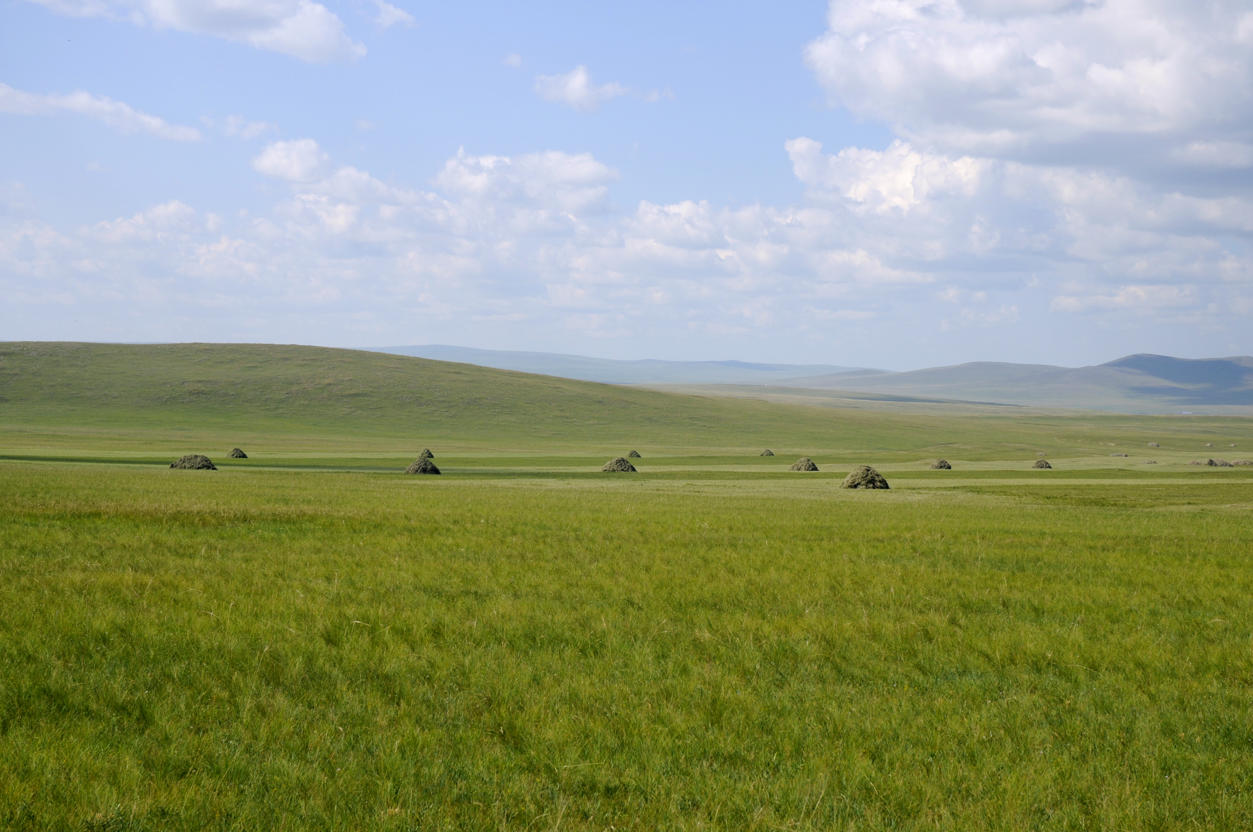 新巴尔虎右旗 草原